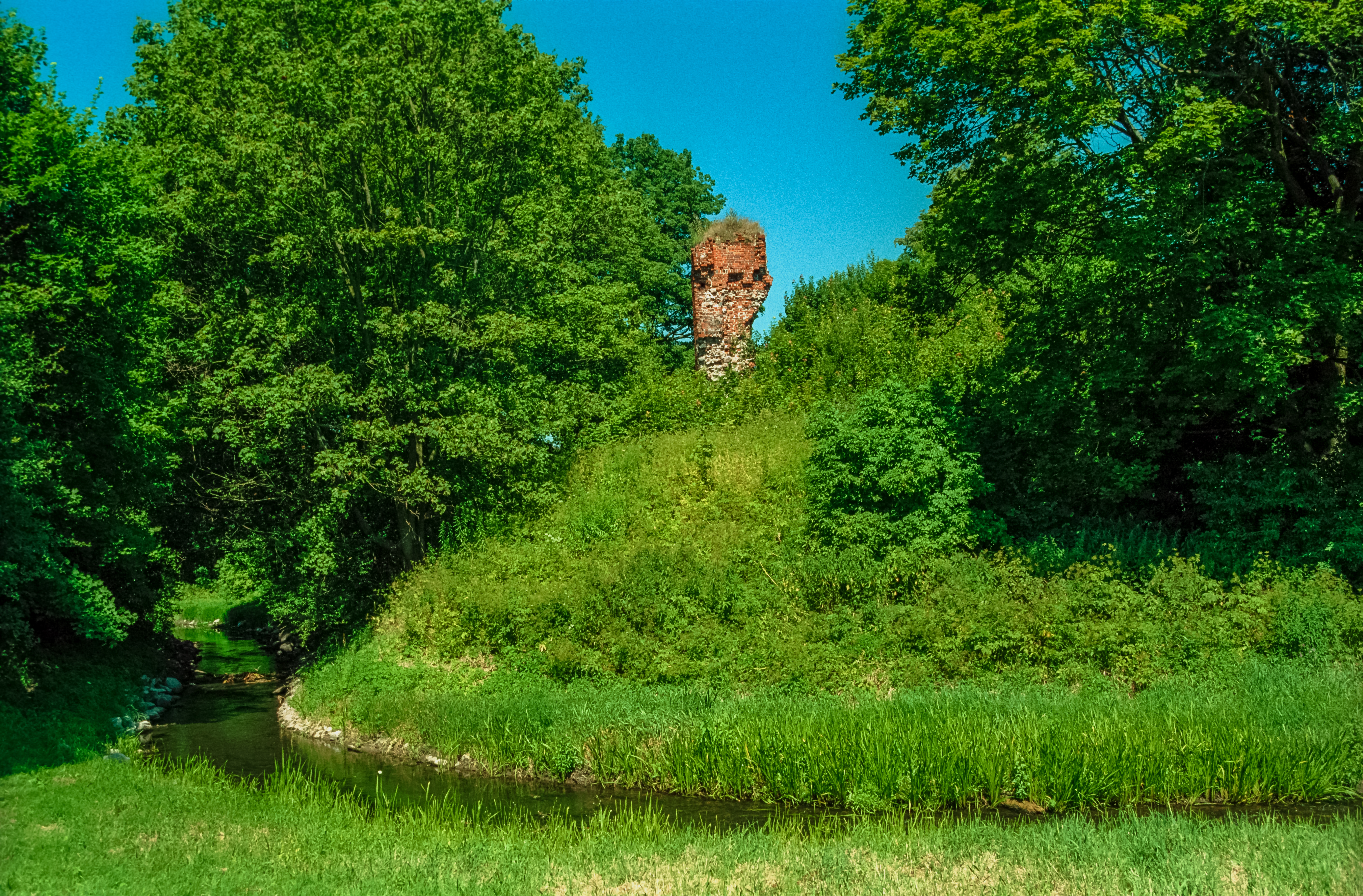 Szestno